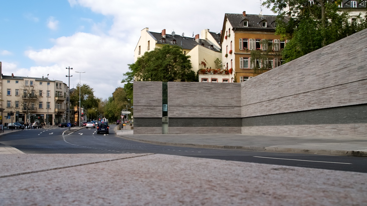 Mahnmal mit den Namen getöteter Wiesbadener Juden an der Stelle der alten Synagoge am Michelsberg